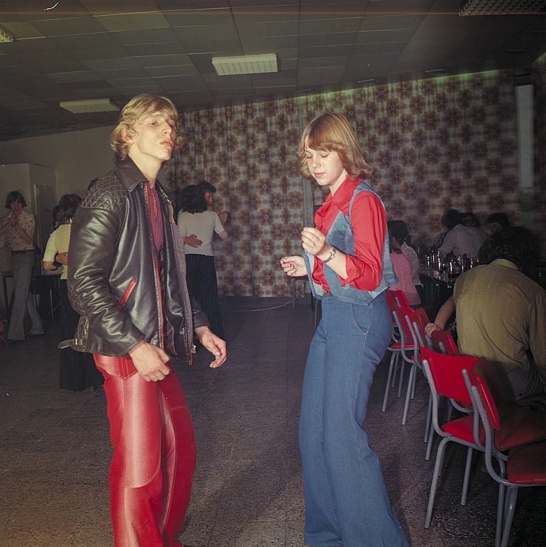 Original image description from the Deutsche Fotothek Disko